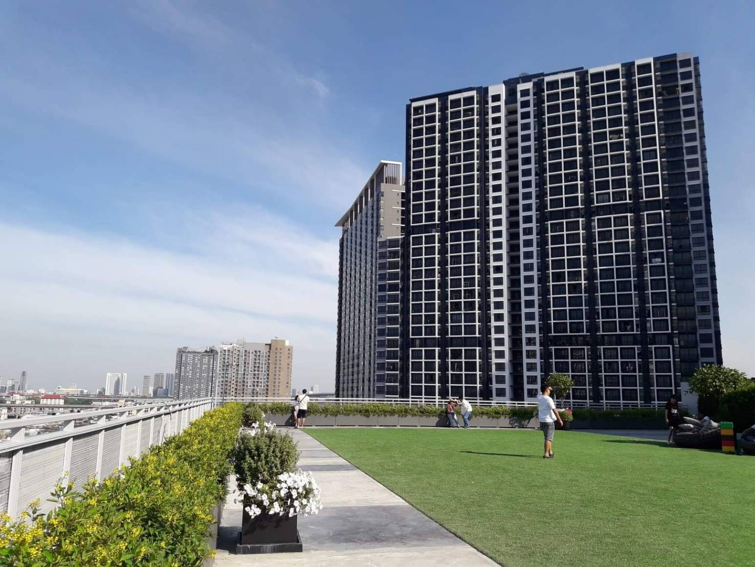 สวนลอยฟ้า Sky Garden ภายในศูนย์การค้า เกทเวย์ แอท บางซื่อ